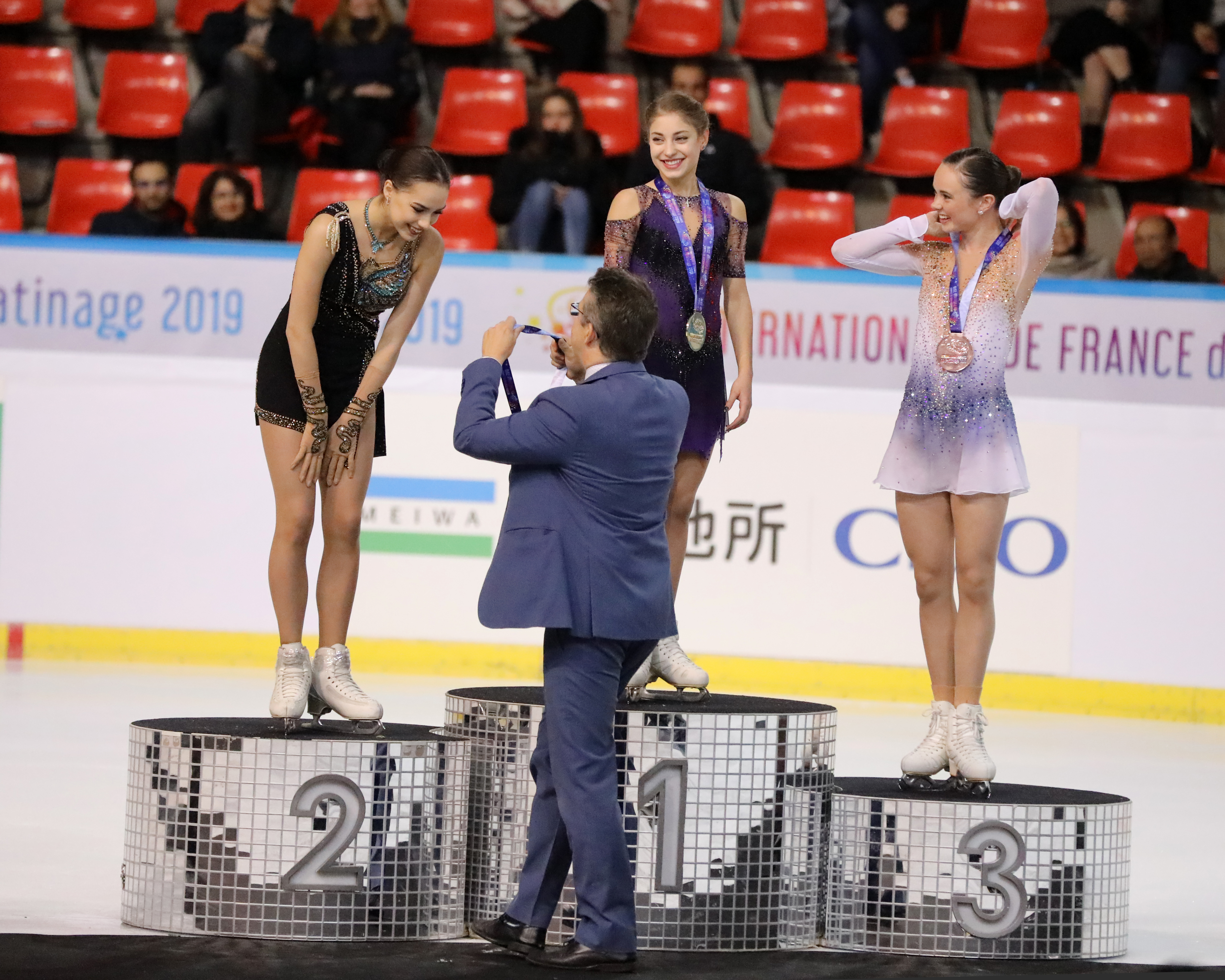 2019 Internationaux de France